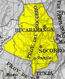 Mapa de la Provincia del Socorro en 1810 y 1830